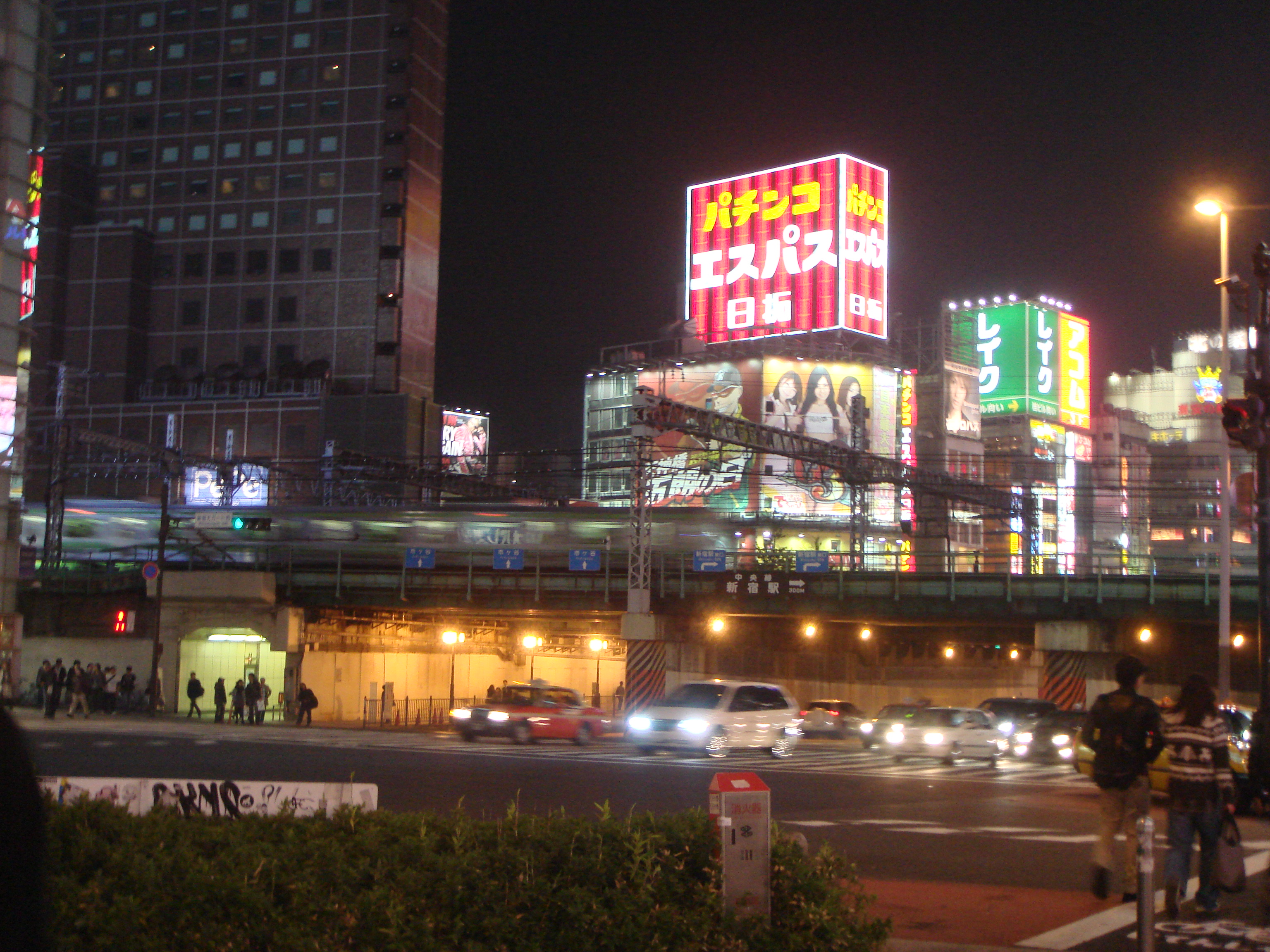 新宿大ガードと歌舞伎町方面です。